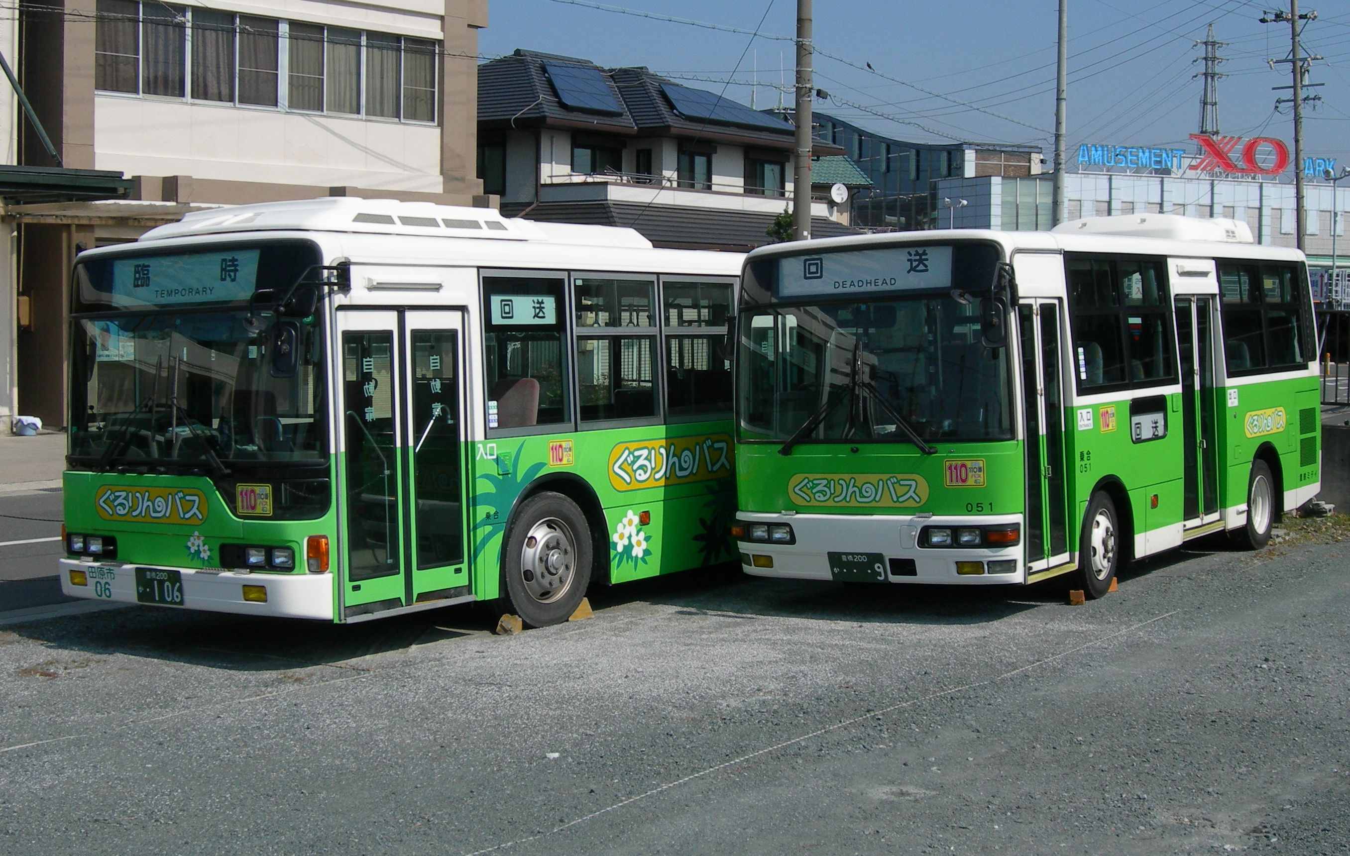 田原市コミュニティバス（ぐるりんバス）